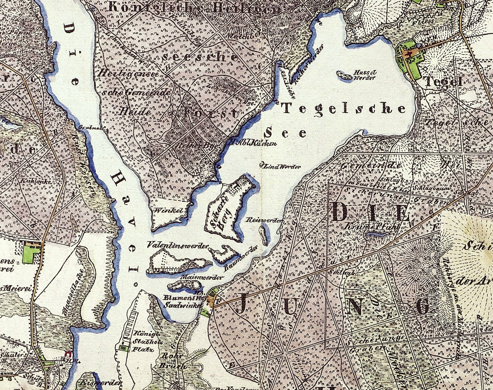 Tegeler See, Berlin: Karte von 1842